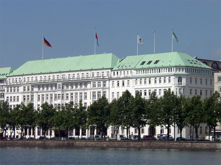 Das Hotel Vier Jahreszeiten an der Alster in Hamburg.